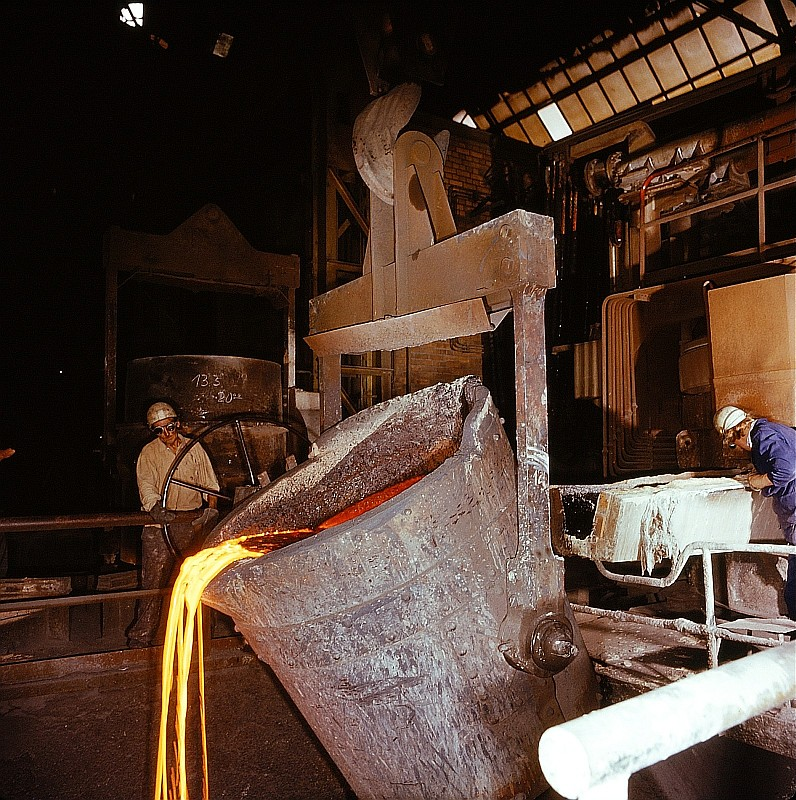 Original image description from the Deutsche Fotothek Facharbeiter für Gießereitechnik